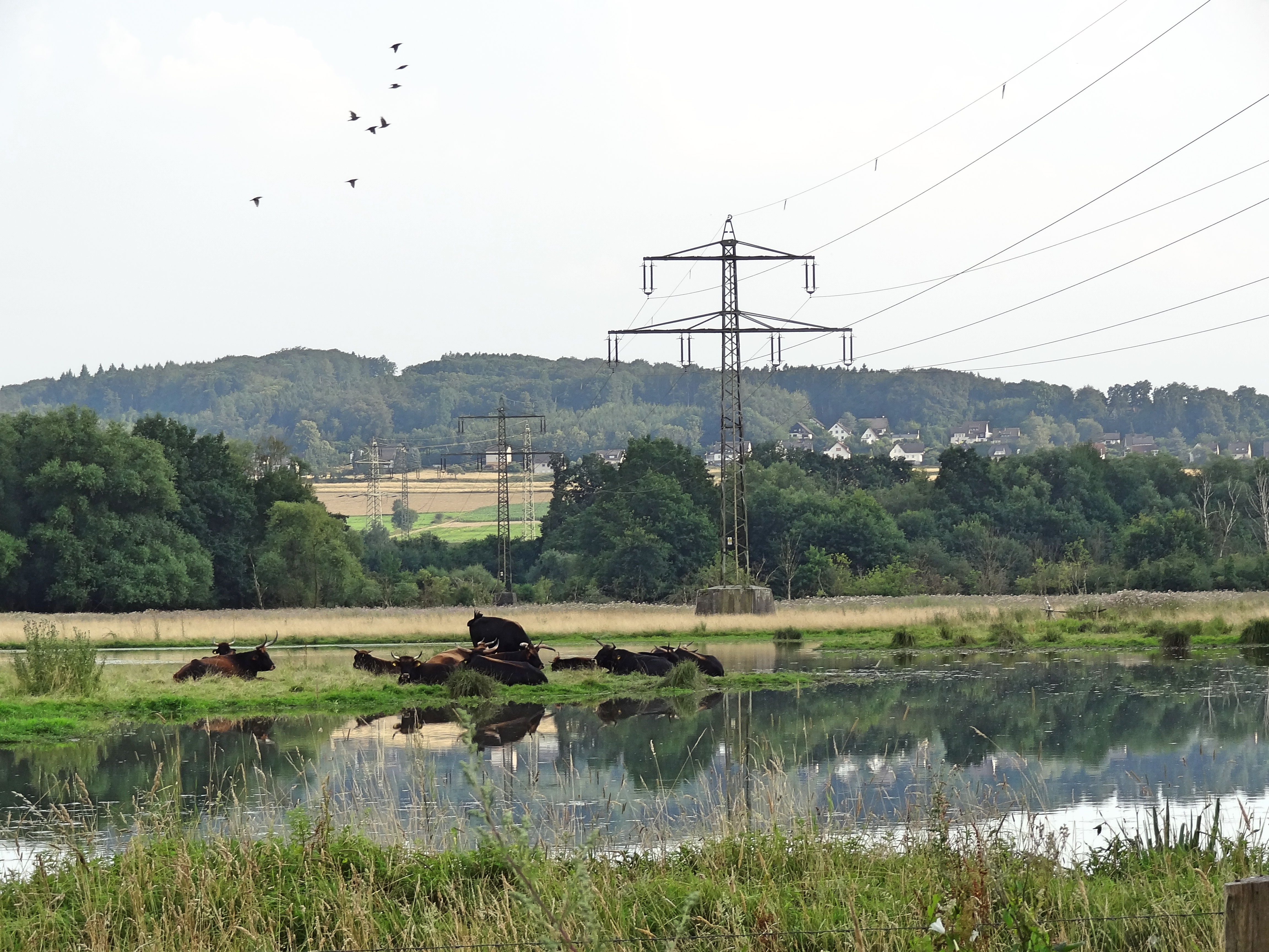 Heckrinder im Naturschutzgebiet „Kiebitzwiese“ (NSG UN-041) in Fröndenberg/Ruhr; im Hintergrund Stadtgebiet Menden; 110-kV-Freileitung (Bl. 1533)